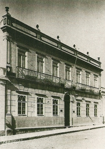 O Museu Republicano em 1923. Arquivo do Museu Paulista.